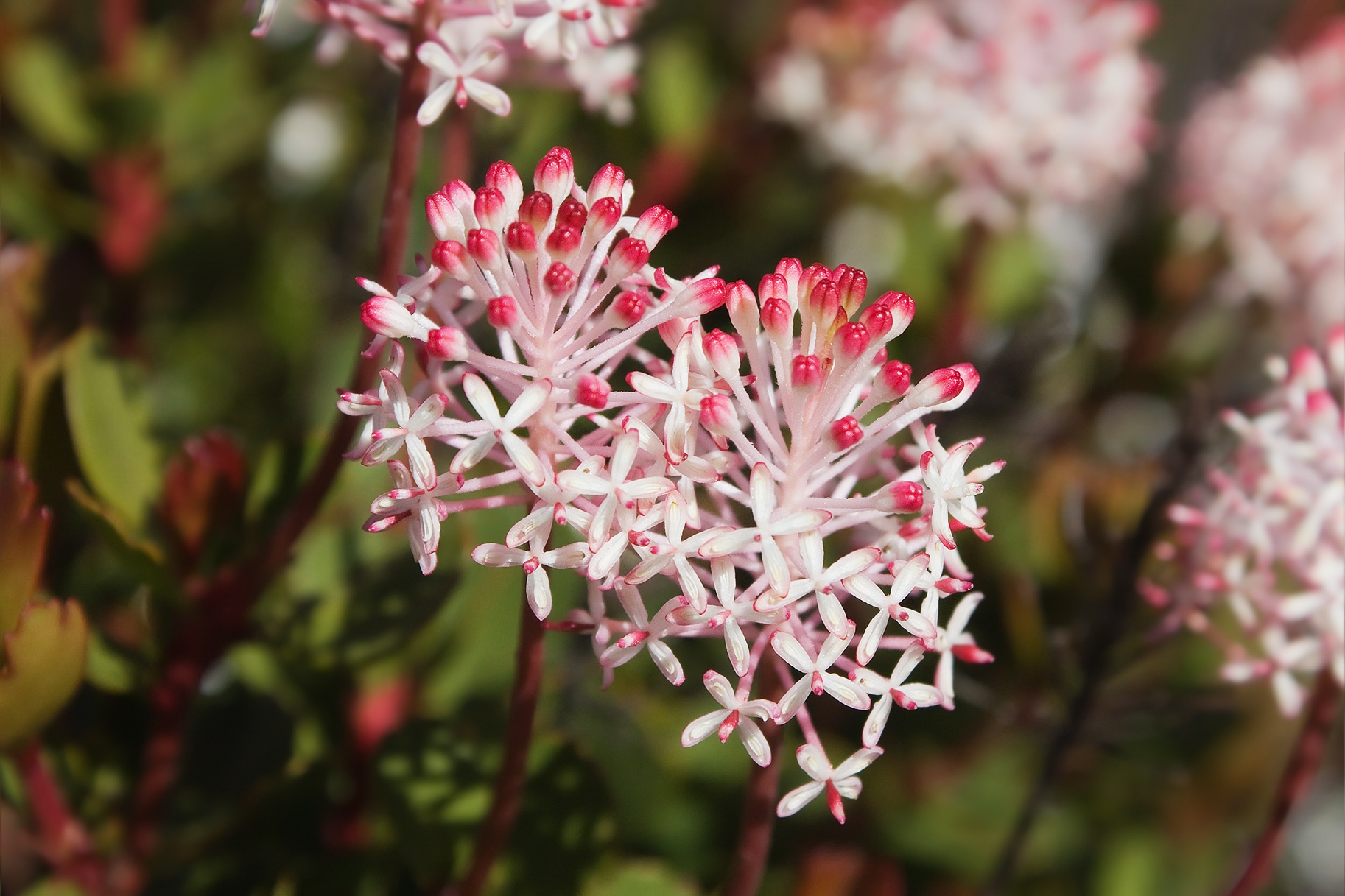 Bellendena montana, Hartz National Park, Tasmania, Australia